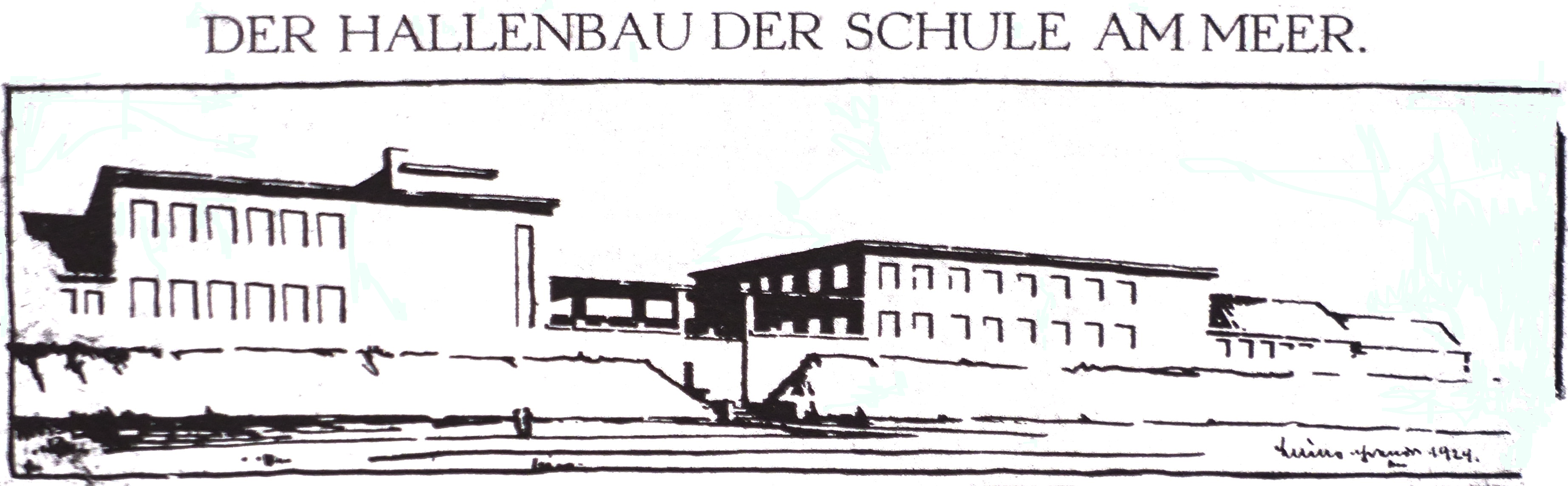 Ansicht der Nordfassade des projektierten Erweiterungsbauprojekts für die Schule am Meer im Loog auf Juist aus dem Jahr 1929. Die Skizze des Berliner Architekten Bruno Ahrends (1878–1948) zeigt links das Funktionsgebäude der Bühnenhalle (auch: Hallenbau), während die angrenzenden Gebäudeprojekte für weitere Bauabschnitte vorgesehen waren.